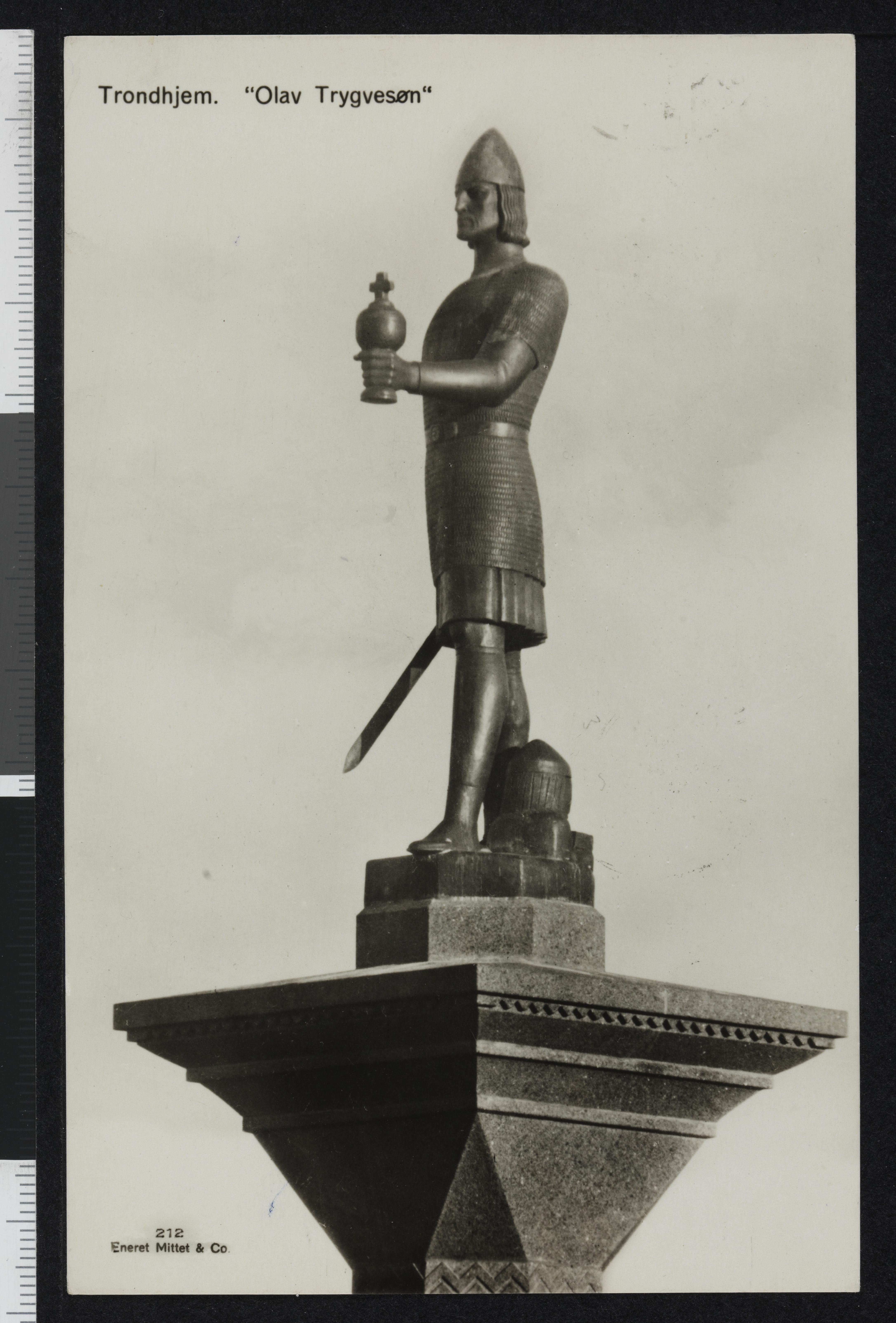 Bildet er hentet fra Nasjonalbibliotekets bildesamling Midtbyen,Torget, Trondheim, Sør Trøndelag